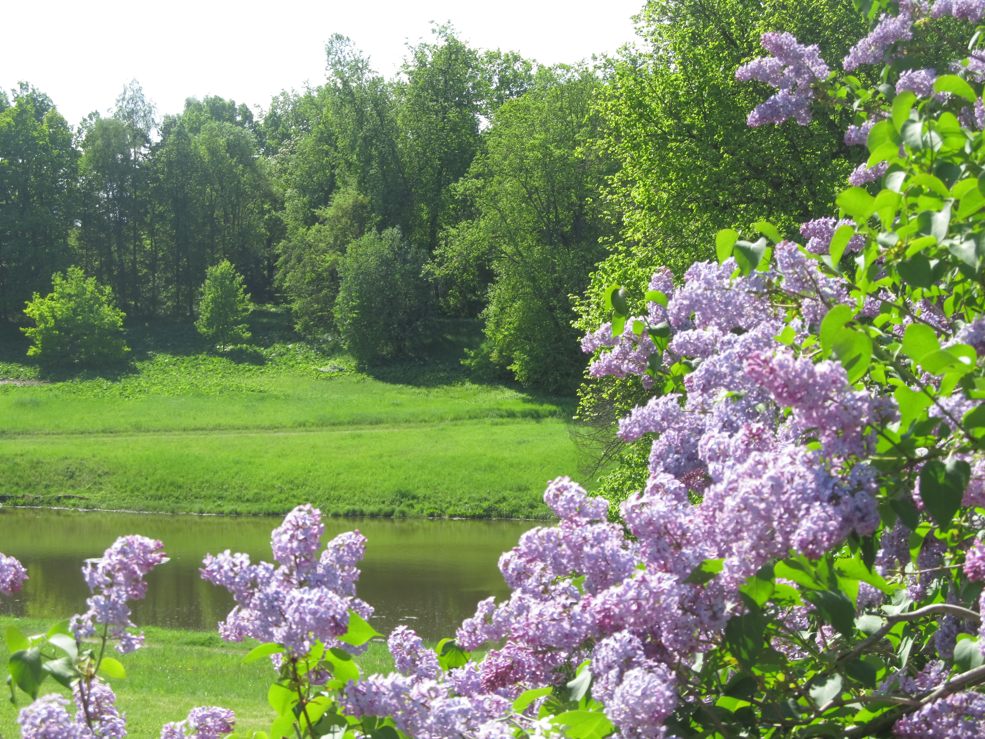 Павловский парк